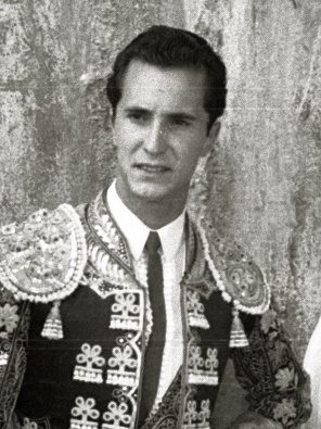 Título original: Corrida de toros en la plaza de 'El Txofre' (67/79) Localización: San Sebastián (Guipúzcoa)